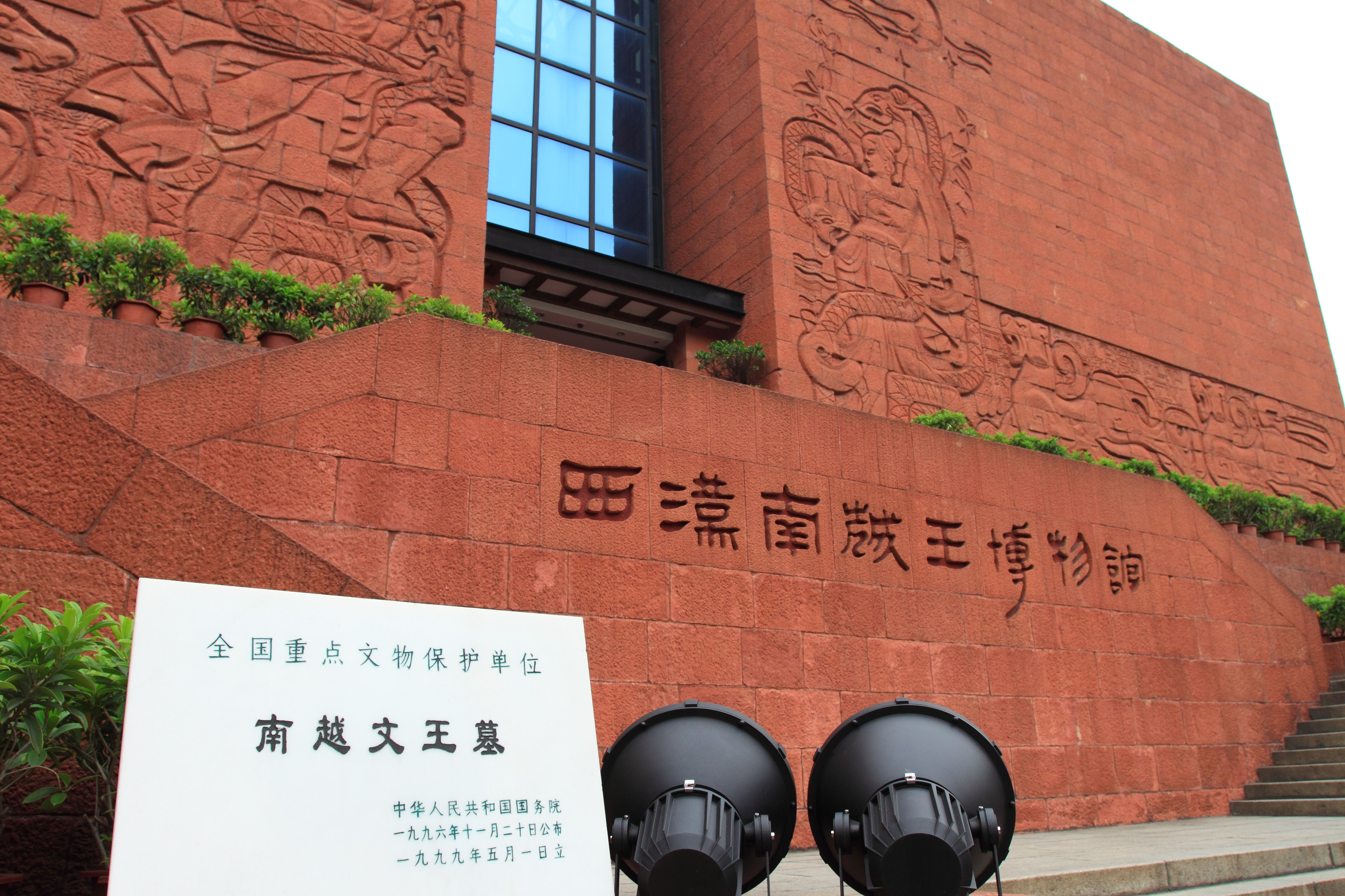 广州西汉南越王博物馆 —— 全国重点文物保护单位标志碑（南越文王墓）